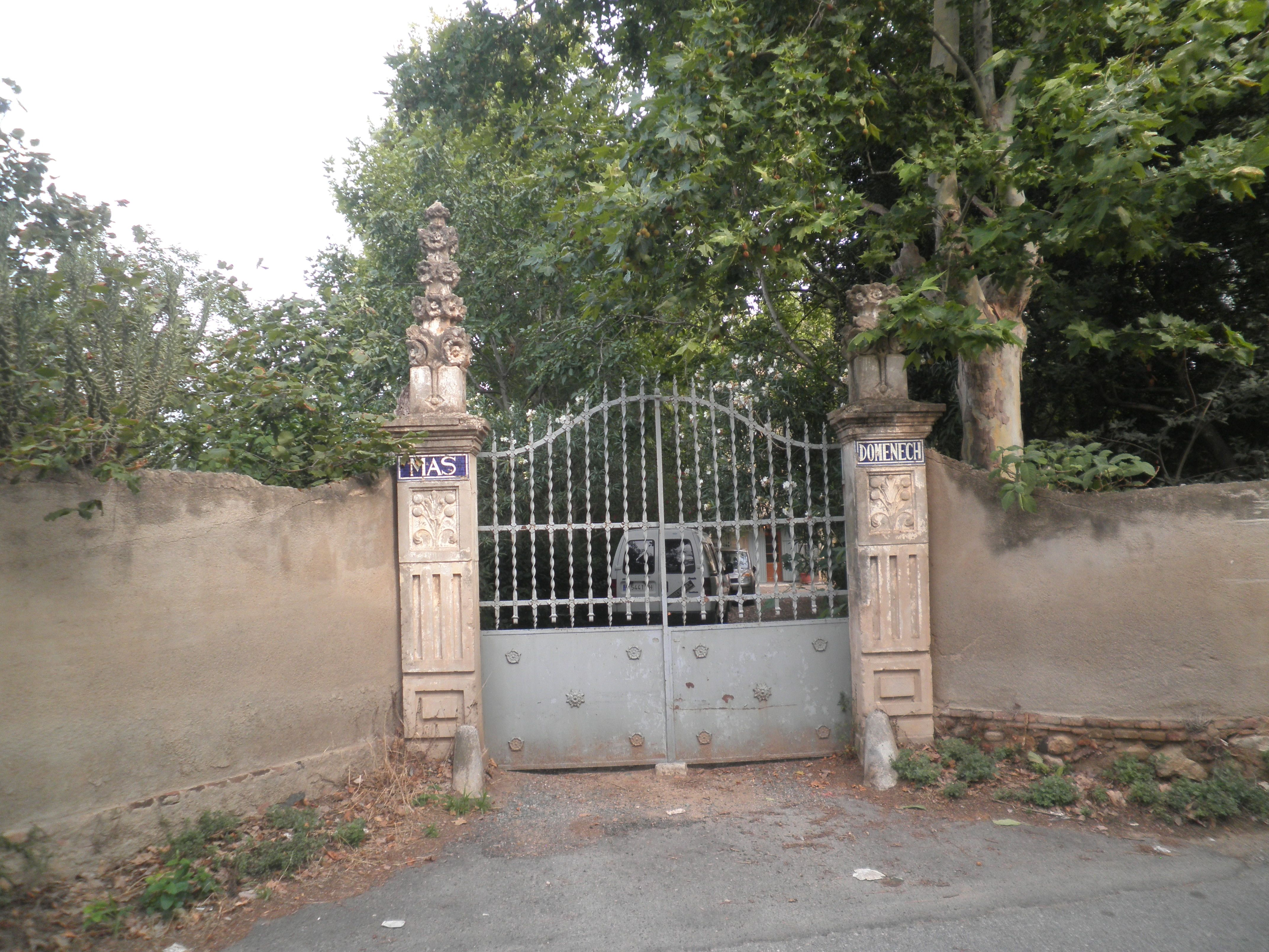 Portalada del Mas del Pere Domènech, al terme de Reus